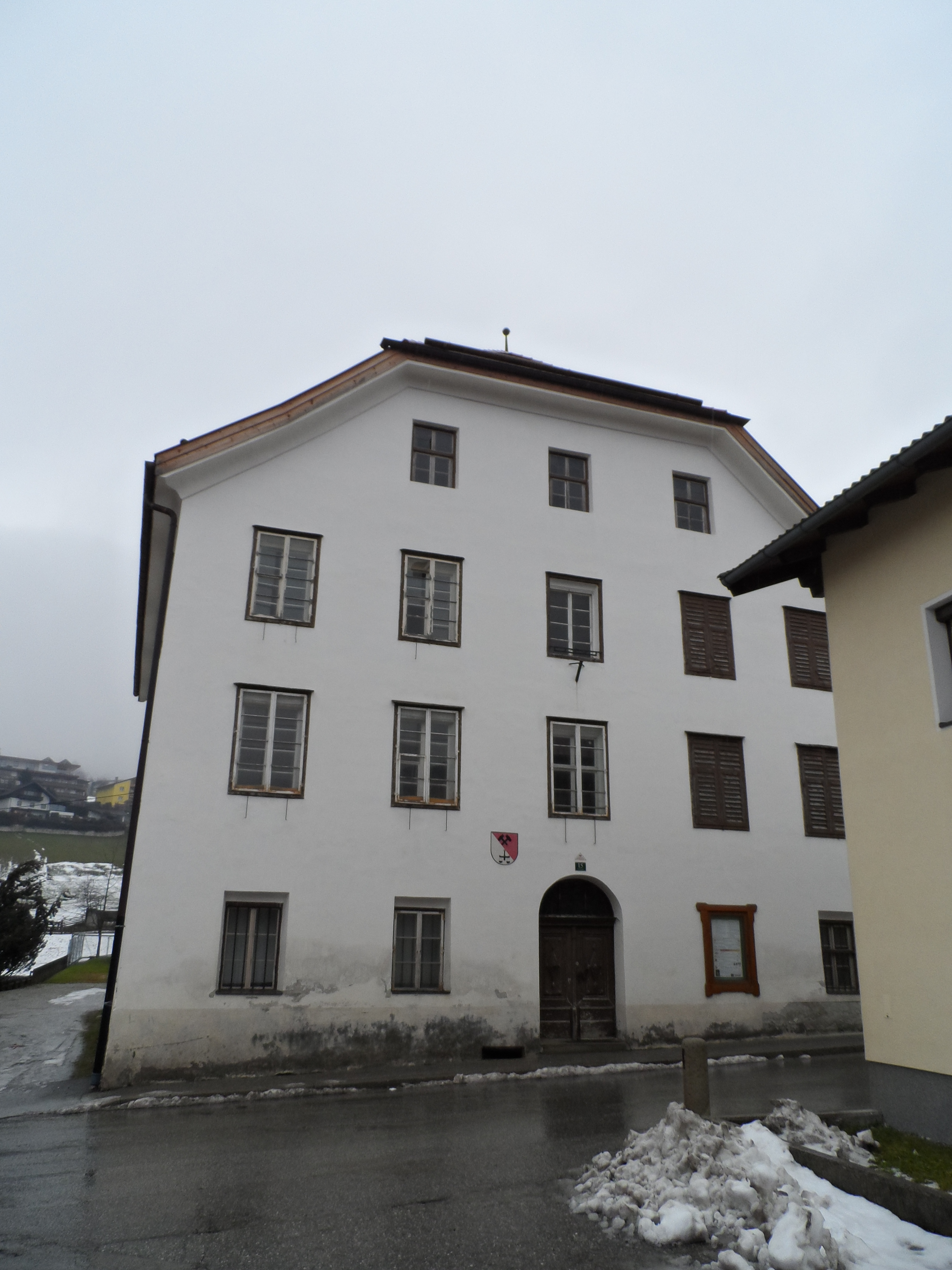 Ehemaliges Gericht - Dorfstraße 15, Mieders